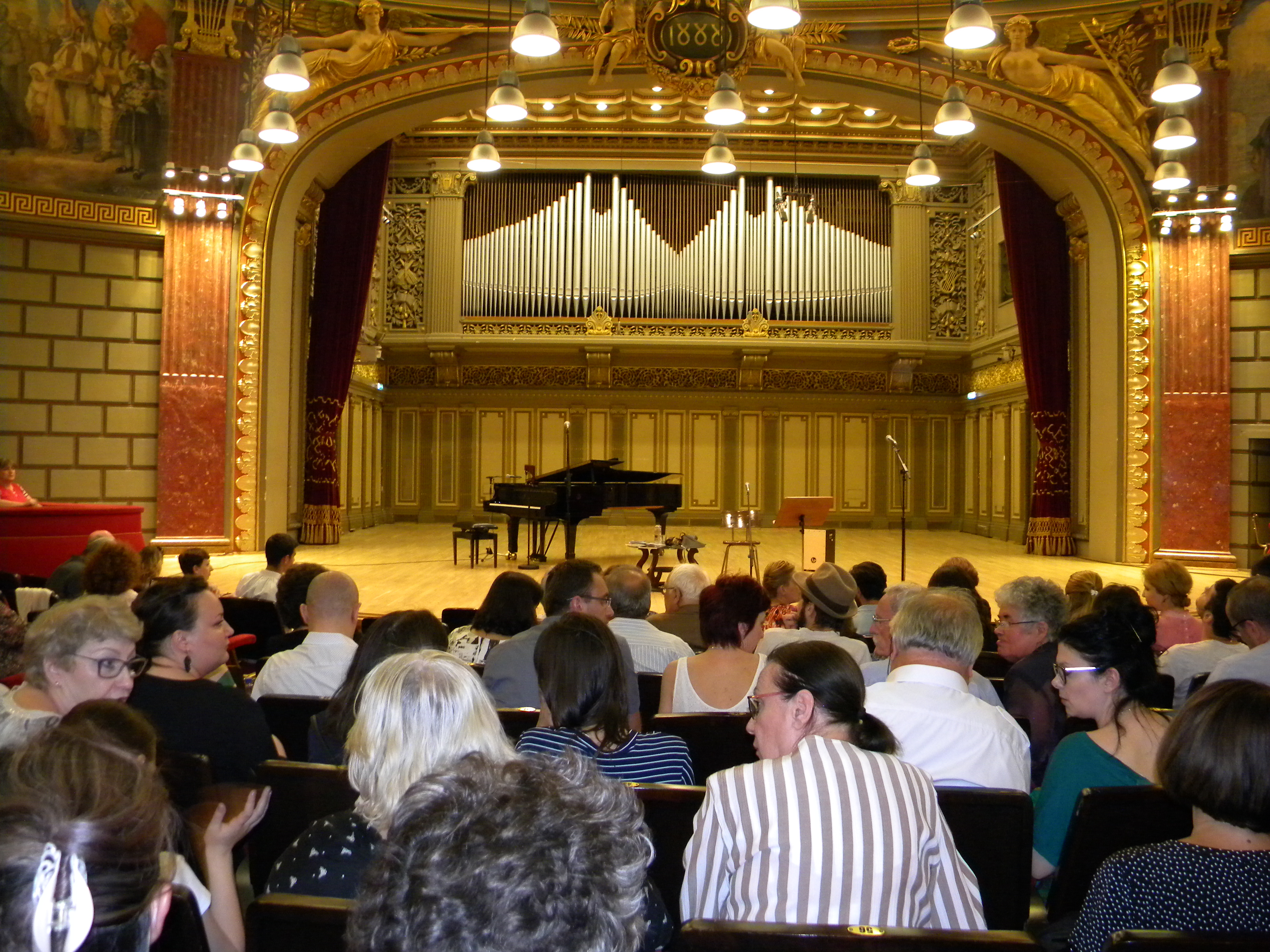 (31) Bucuresti, Romania. Ateneul Roman (scena)(10 Iunie 2017).